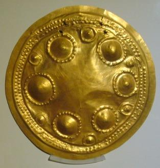 Disco de oro de la cultura del Díquis, Pacífico sur de Costa Rica. 700-1550. Museo del Oro Precolombino, San José de Costa Rica.